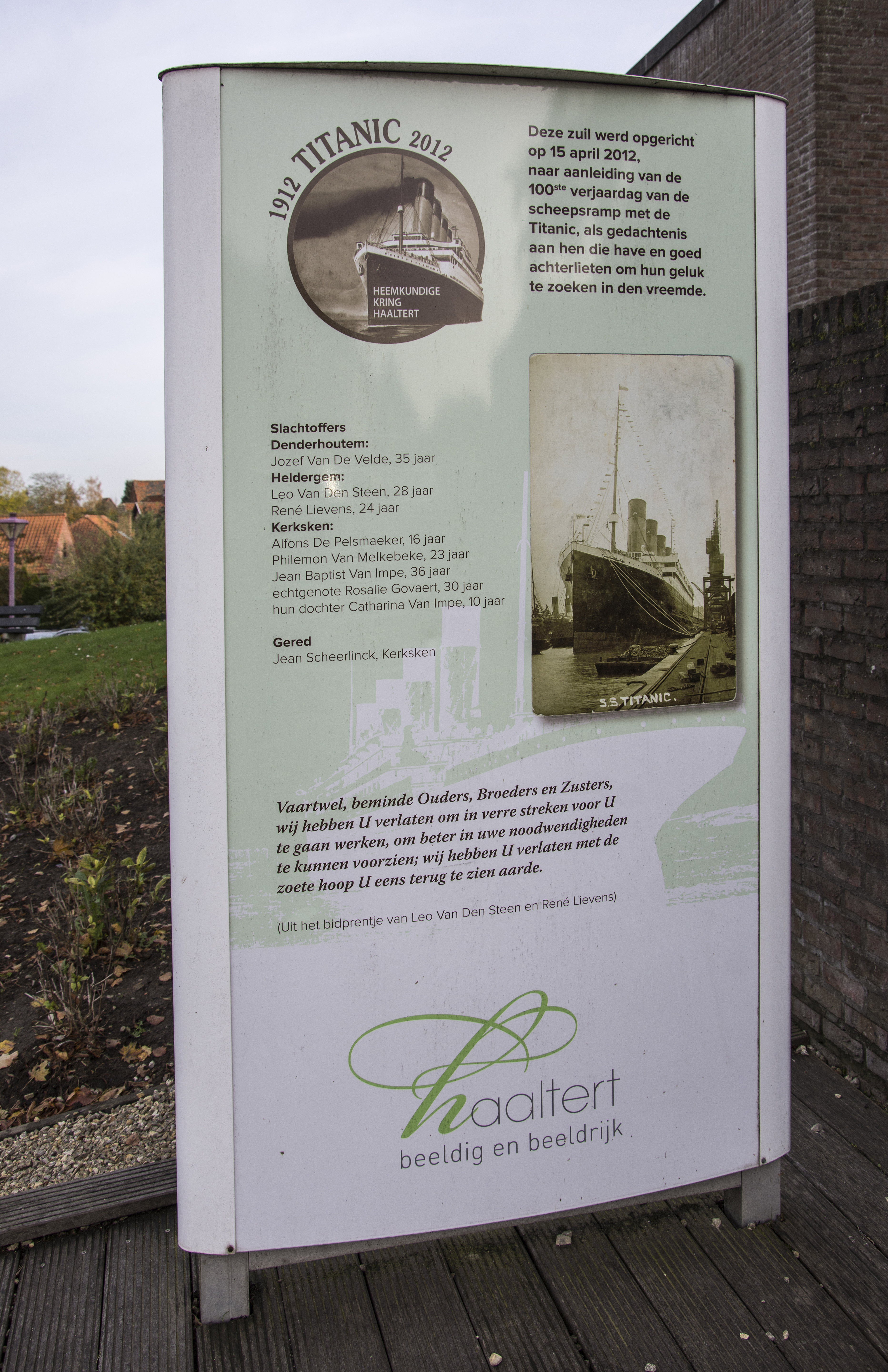 Gedenkzuil Titanic Kerksken 16-11-2019 14-35-02 This photo of immovable heritage has been taken in the Flemish Region